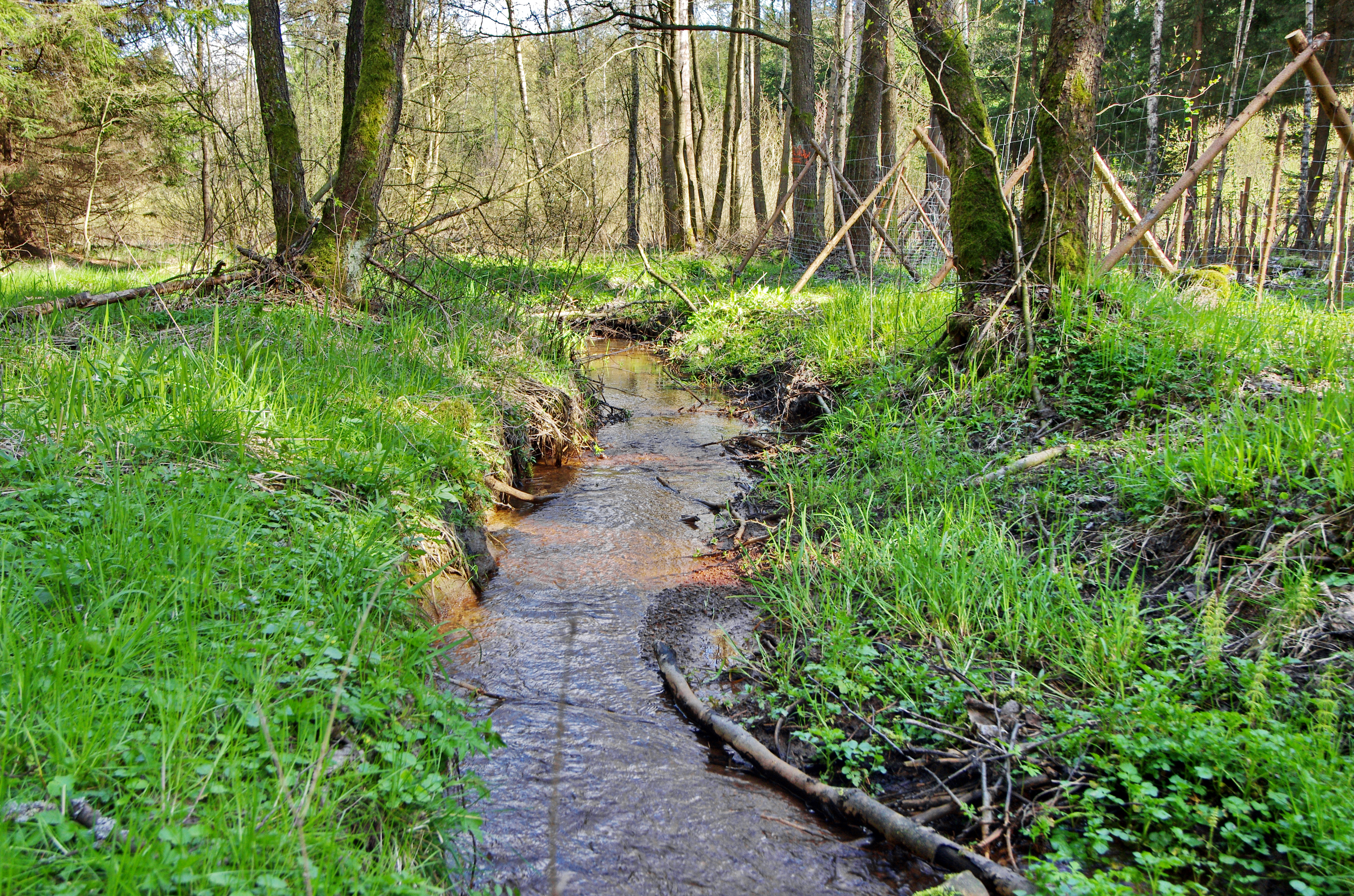 Panský potok (přítok Kosového potoka) u obce Drmoul, okres Cheb